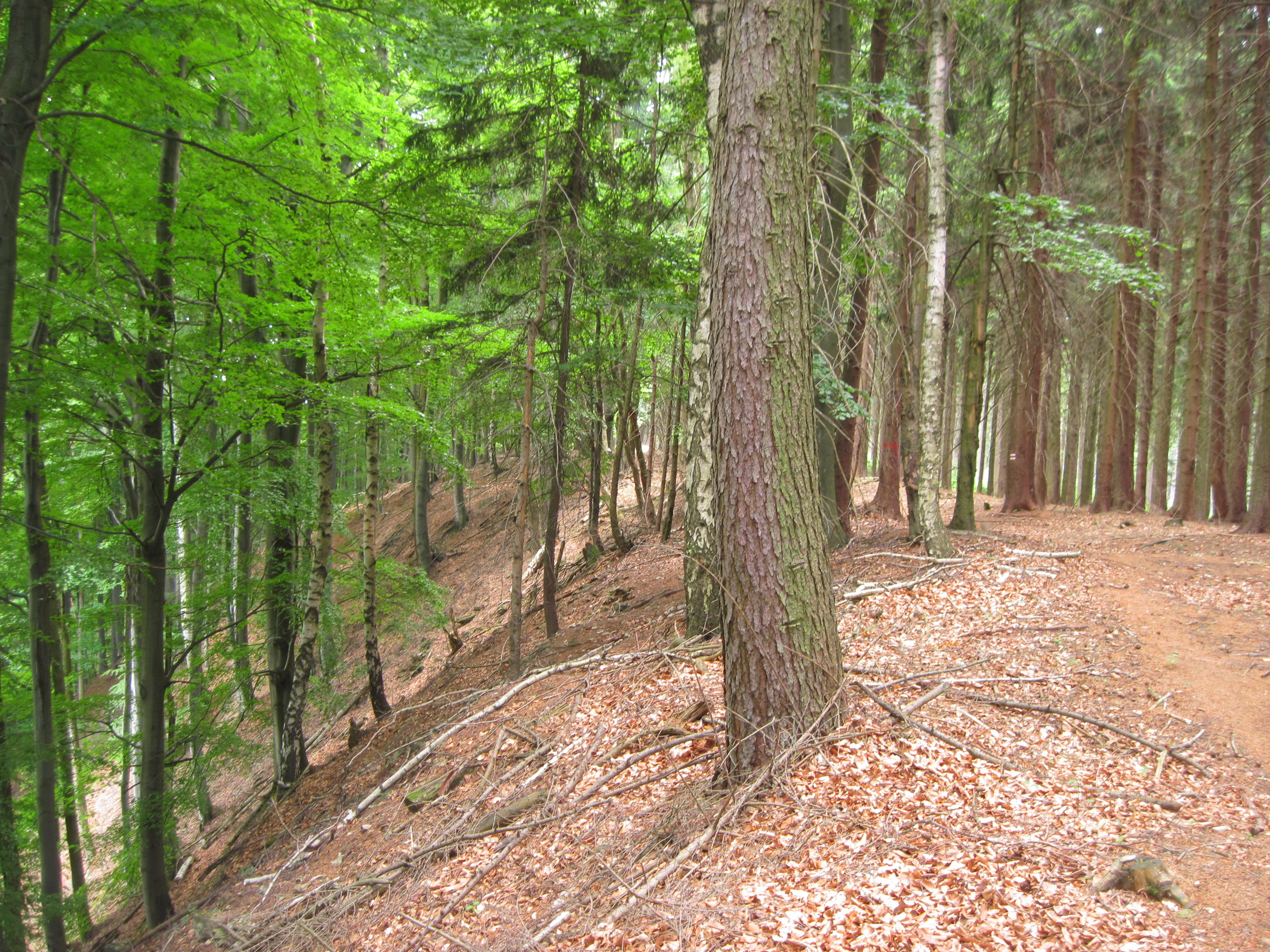 Hraniční hřeben přírodní rezervace Rohová - vlevo PR, vpravo ne Project: Chráněná území.